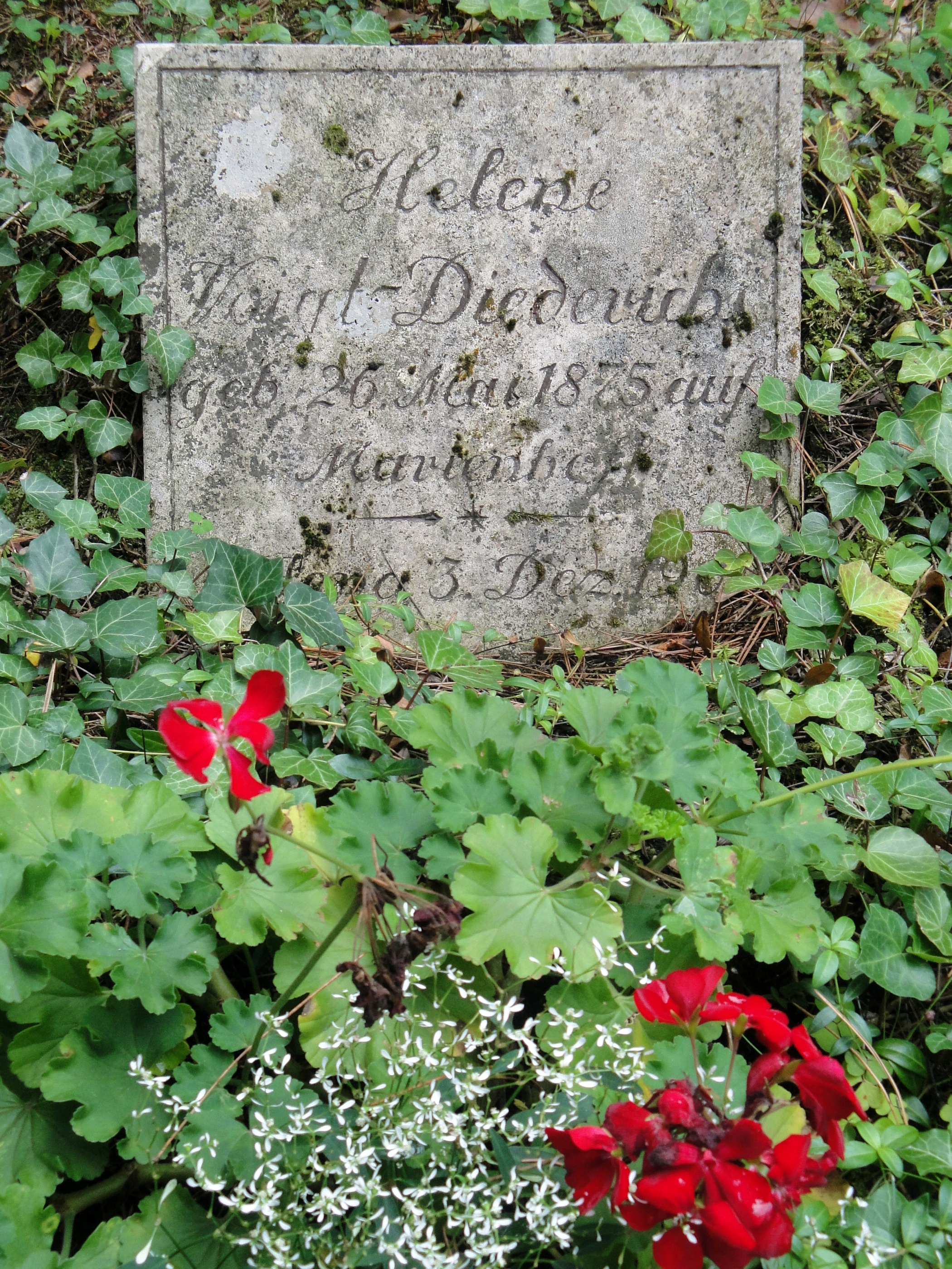 Grab von Helene Theodora Voigt-Diederichs auf dem Nordfriedhof (Feld 11) in Jena